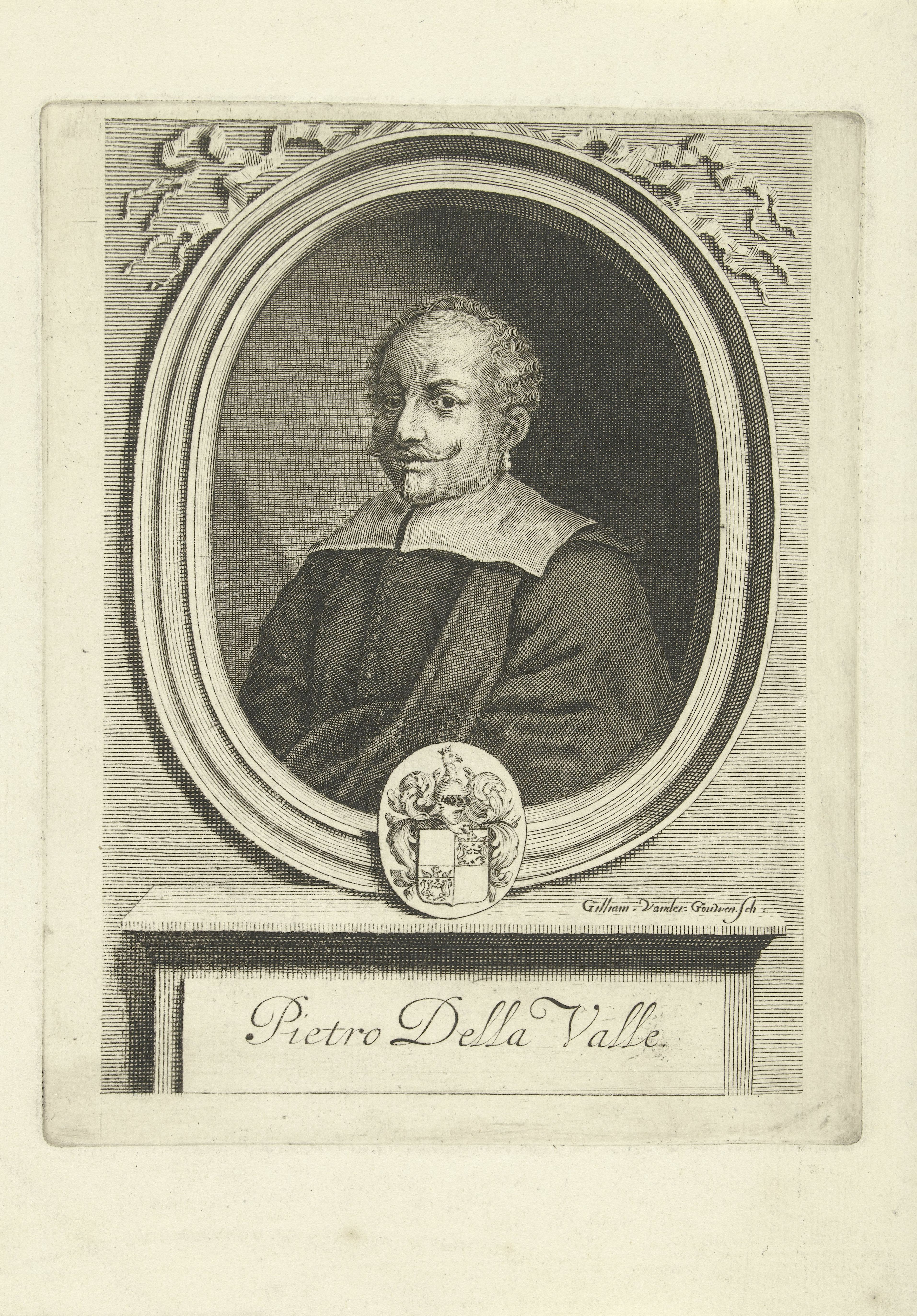 IdentificatieTitel(s): Portret van Pietro della VallaObjecttype: prent Objectnummer: RP-P-1909-4464Catalogusreferentie: Hollstein Dutch 2Opschriften / Merken: verzamelaarsmerk, verso midden onder, gestempeld: Lugt 2228Omschrijving: Portret in een ovale lijst van de Italiaan Pietro della Valla, een bekende reiziger van de Oriënt.VervaardigingVervaardiger: prentmaker: Gilliam van der Gouwen (vermeld op object)Plaats vervaardiging: AmsterdamDatering: 1669 - ca. 1740Fysieke kenmerken: gravureMateriaal: papier Techniek: graveren (drukprocedé)Afmetingen: plaatrand: b 146 mm × h 186 mmOnderwerpWie: Pietro della ValleVerwerving en rechtenVerwerving: aankoop 1905Copyright: Publiek domein